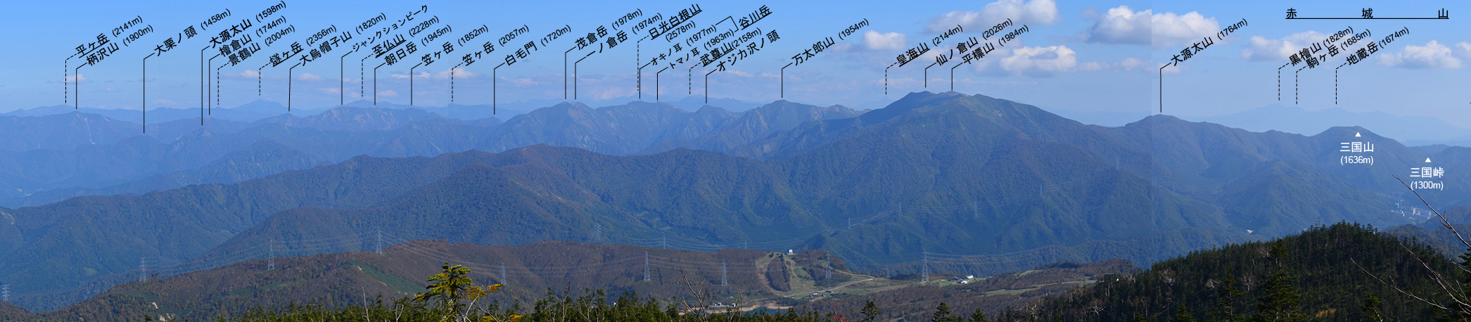 苗場山中腹(上ノ芝)より望む谷川連峰の全景(山座同定つき)。2016年10月15日撮影。